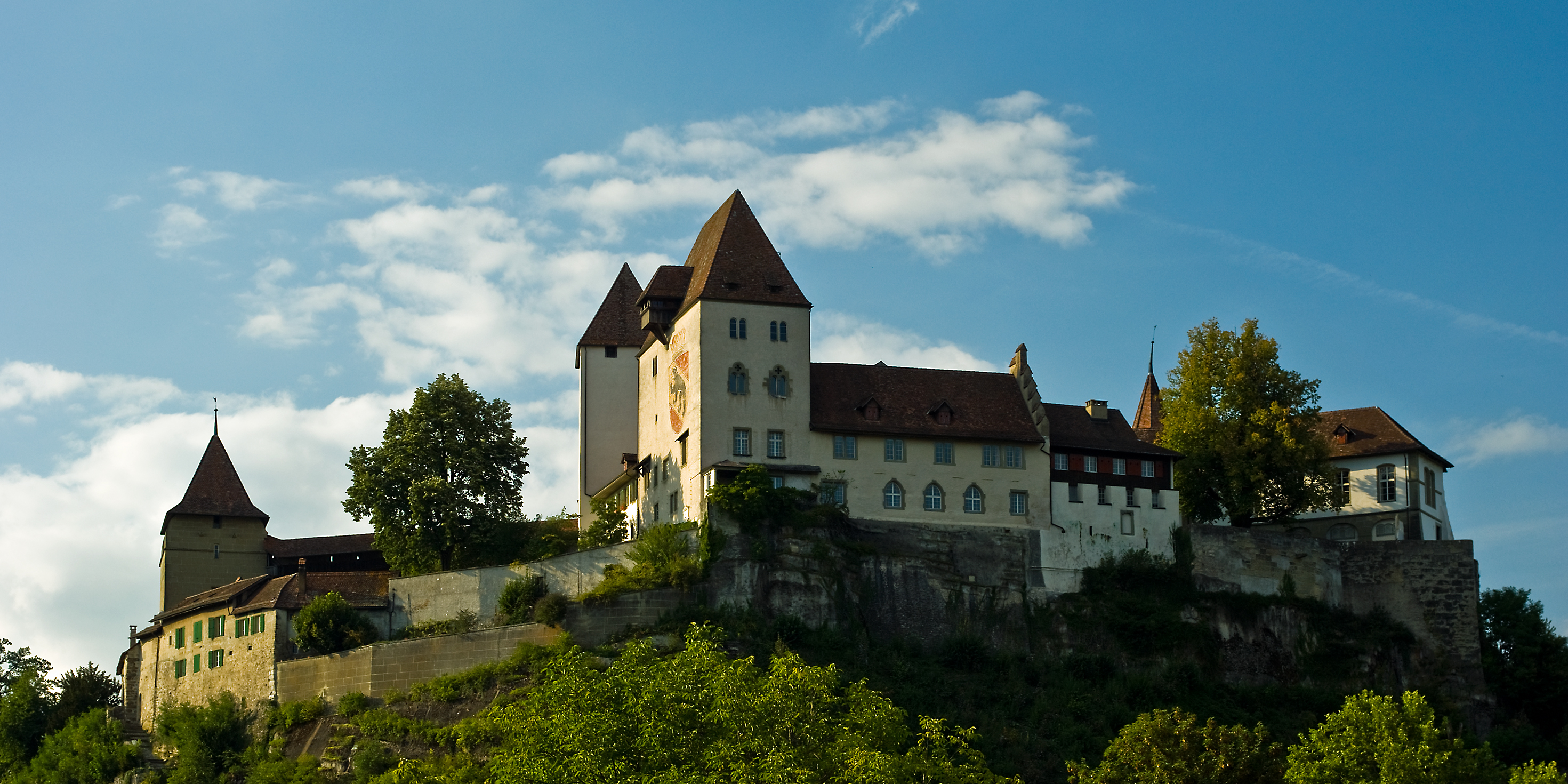 Burgdorf, Schlossanlage im Abendlicht